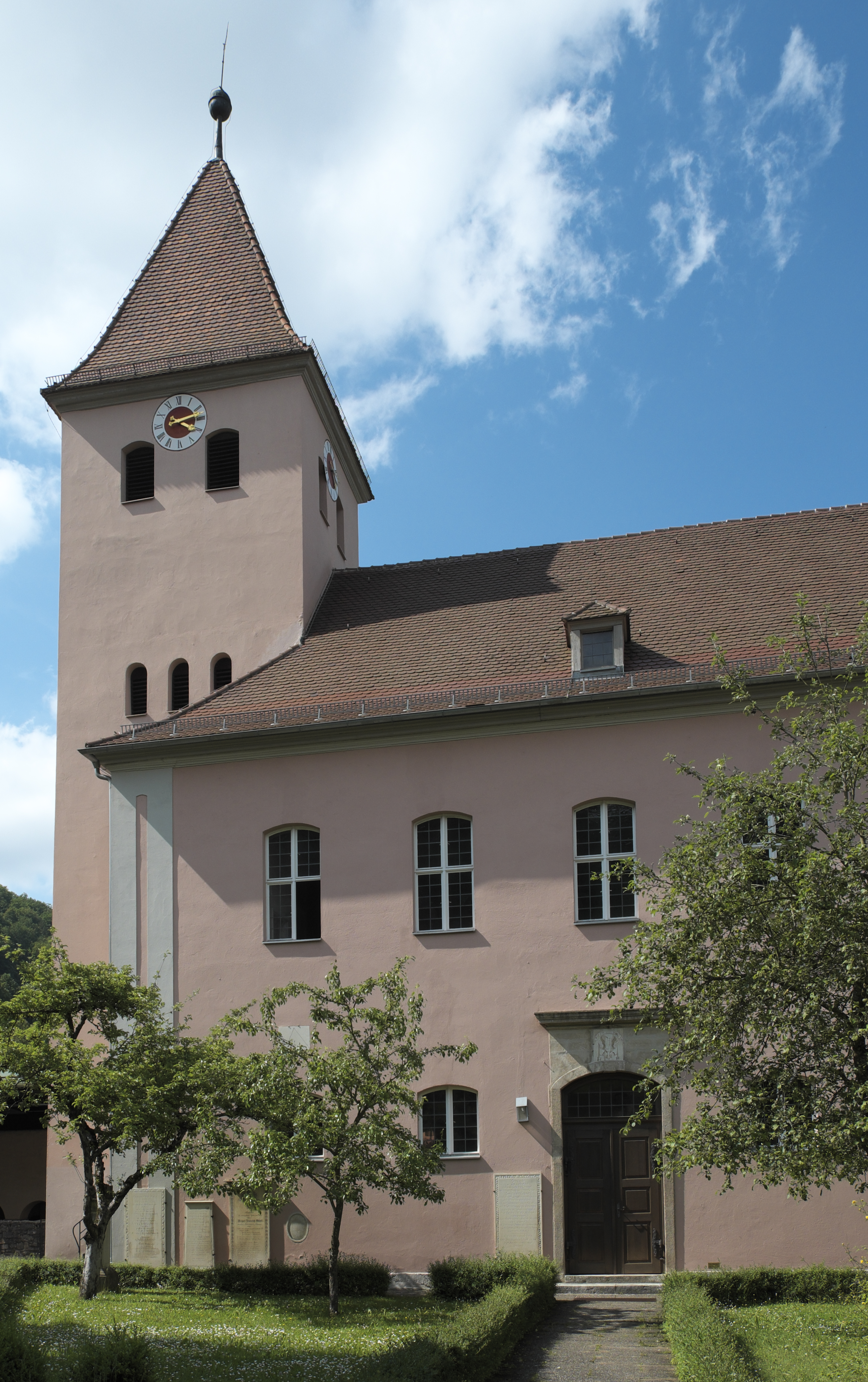 Evangelisch-lutherische Pfarrkirche, ehemals St. Veit, in Solnhofen im Landkreis Weißenburg-Gunzenhausen (Bayern)